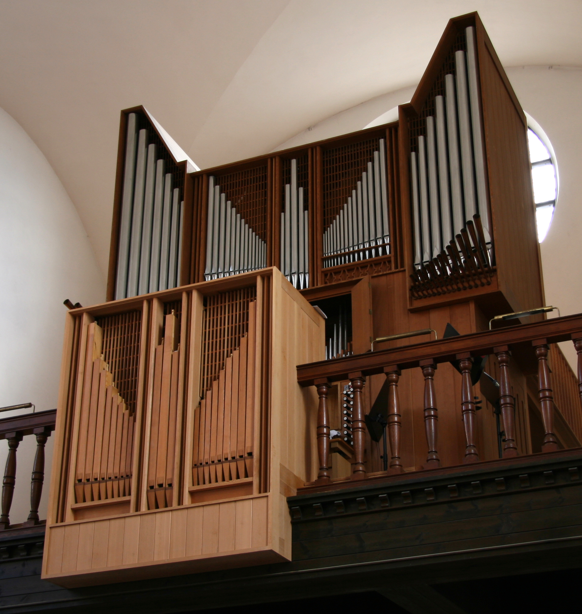 Samuels Kirke in Copenhagen, Denmark. Organ.